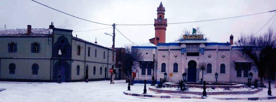 La poste du centre ville d'El Bayadh sous la neige